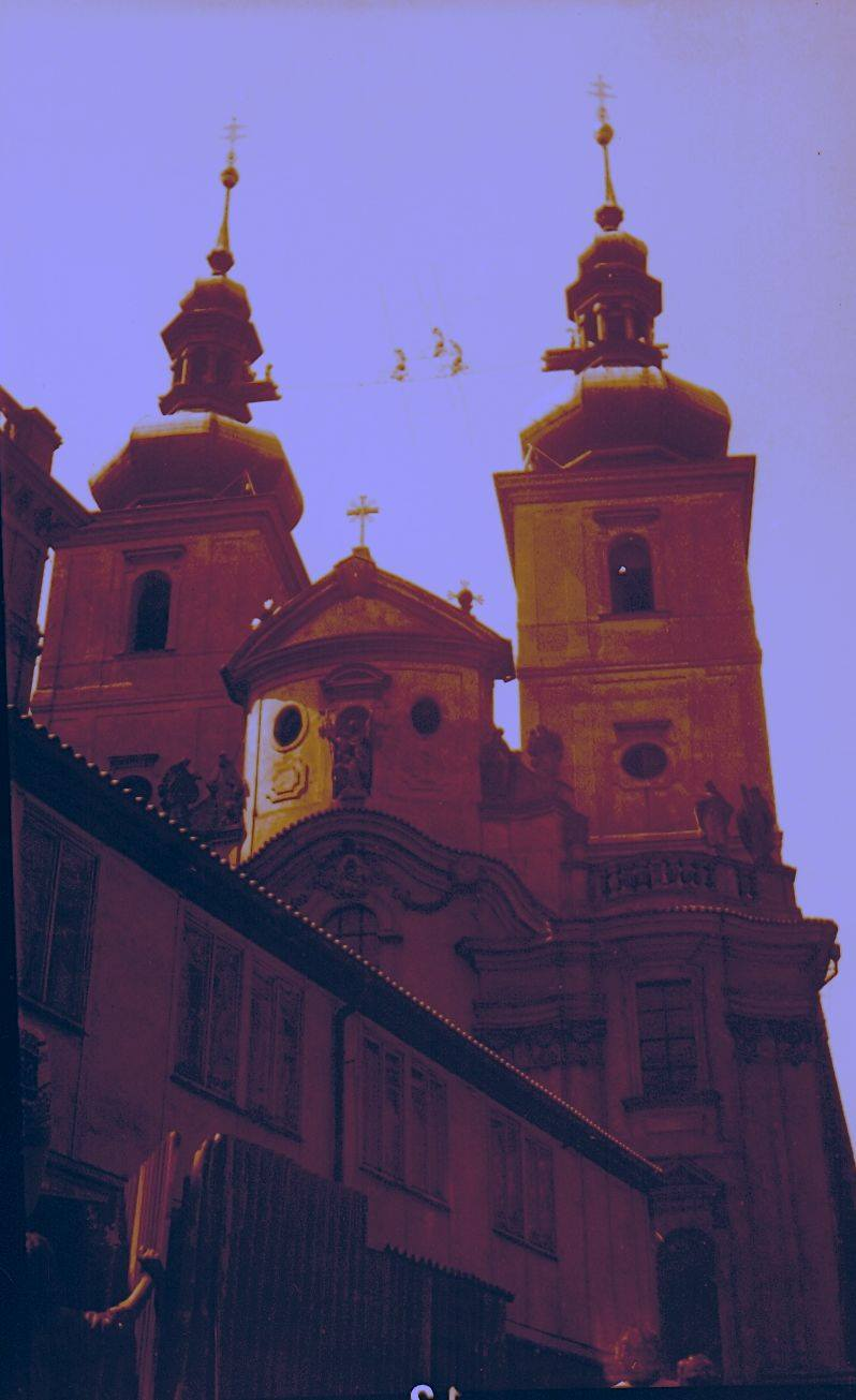 Pyramida 3 můžu na laně napnutém mezi věžemi kostela sv. Havla. Pyramida je složená z 2 mužů jedoucích na kolech a třetího sedícího na pyramidě na kole.